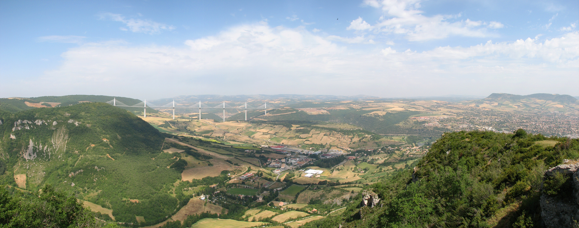 Le Viaduc de Millau